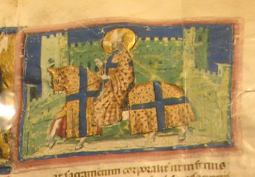 Statuta Civitatis Mutine, 1327. Codice membranaceo, scrittura gotica disposta su due colonne, con rubriche in inchiostro rosso. Particolare di San Geminiano